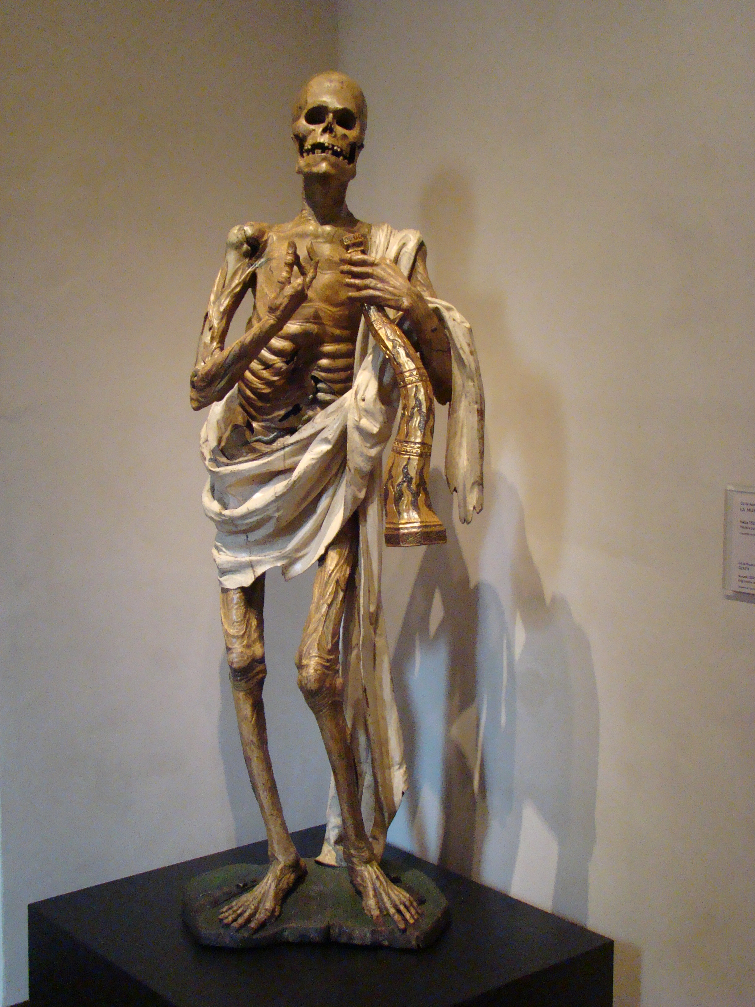 Escultura de Gil de Rozas. Museo de Escultura de Valladolid (España). 1523. Procede de Zamora como parte de un conjunto de 11 grupos colocados en la capilla del deán Vázquez de Cepeda en la iglesia de San Francisco. Secuencia iconográfica relacionada con el ciclo del Credo.